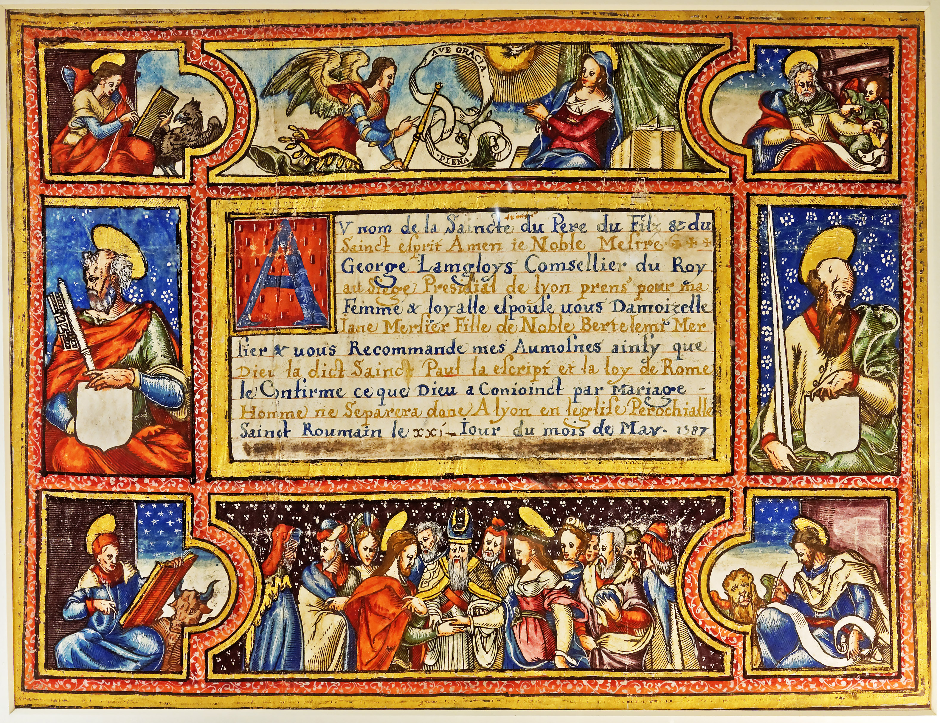 Charte de mariage de George Lamgloys et de Jane Mersier - 21 mai 1587 Enluminure sur parchemin. Lyon, Bibliothèque municipale de Lyon. Coste 343-1 Exposition : Lyon Renaissance. Arts et humanisme.